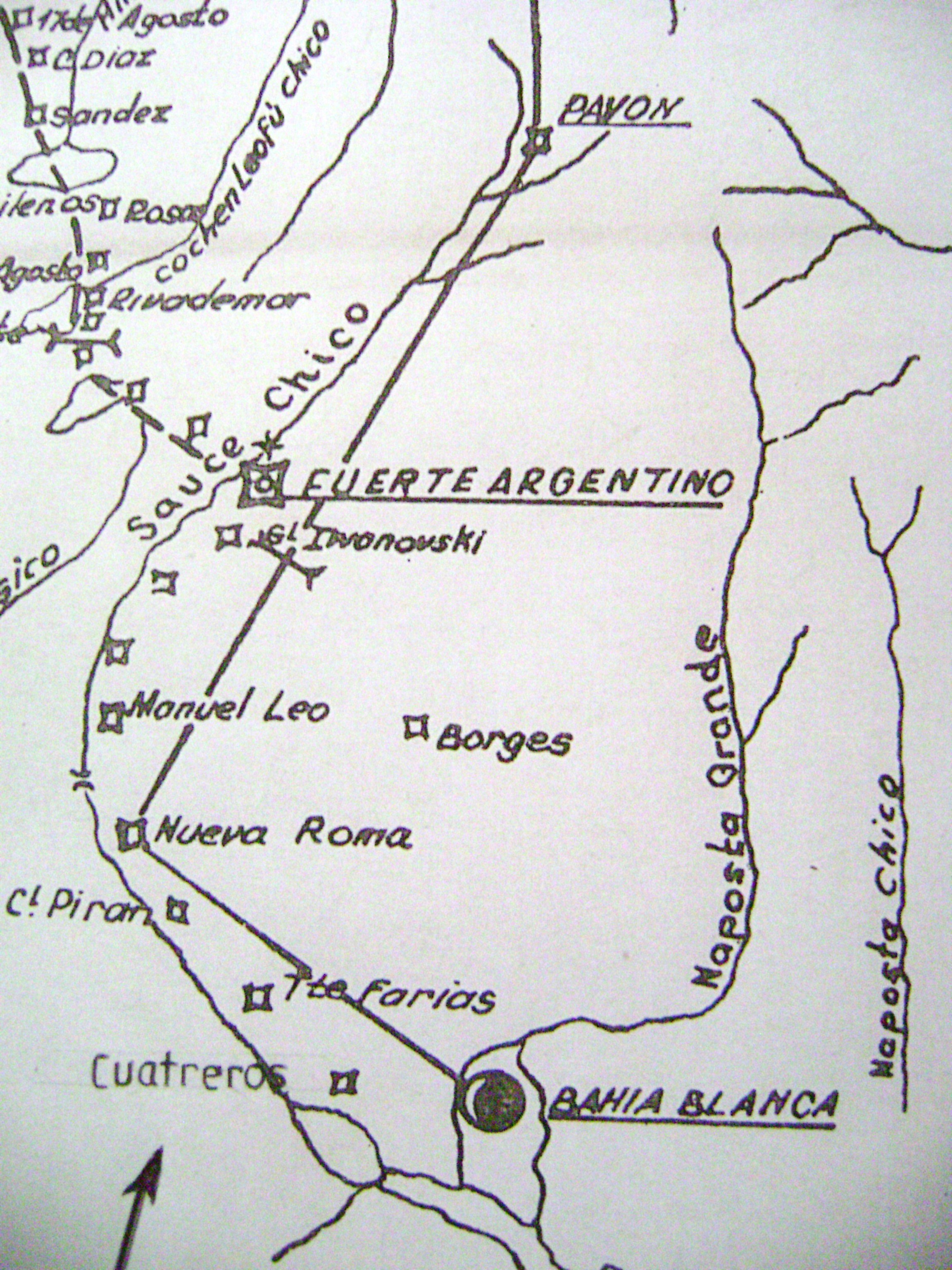 Plano de los fortines ubicados en la márgen izquierda del Río Sauce Chico desde "Catreros hasta "Fuerte Argentino"